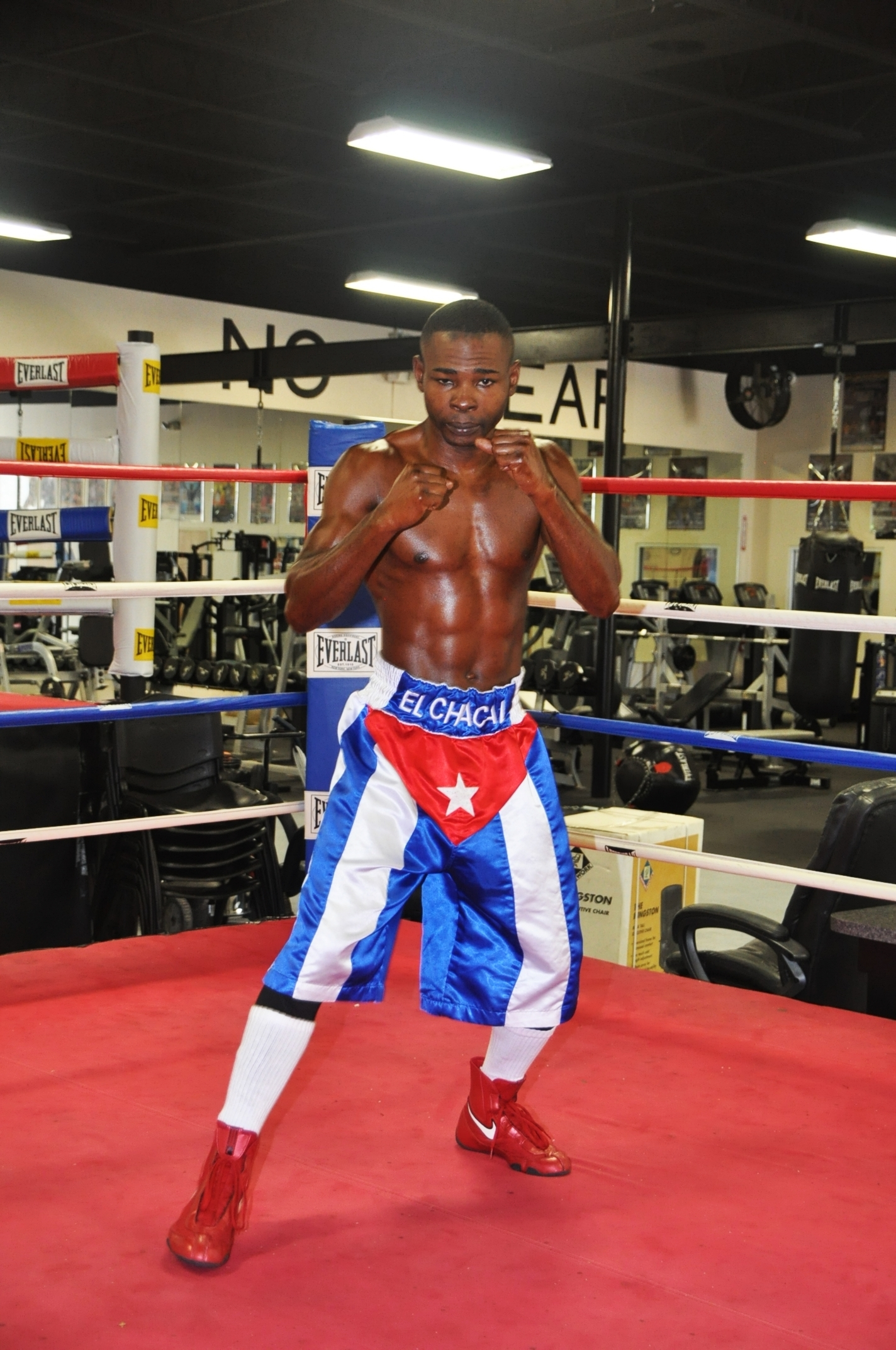 Guillermo Rigondeaux en su campo de entrenamientos de Florida